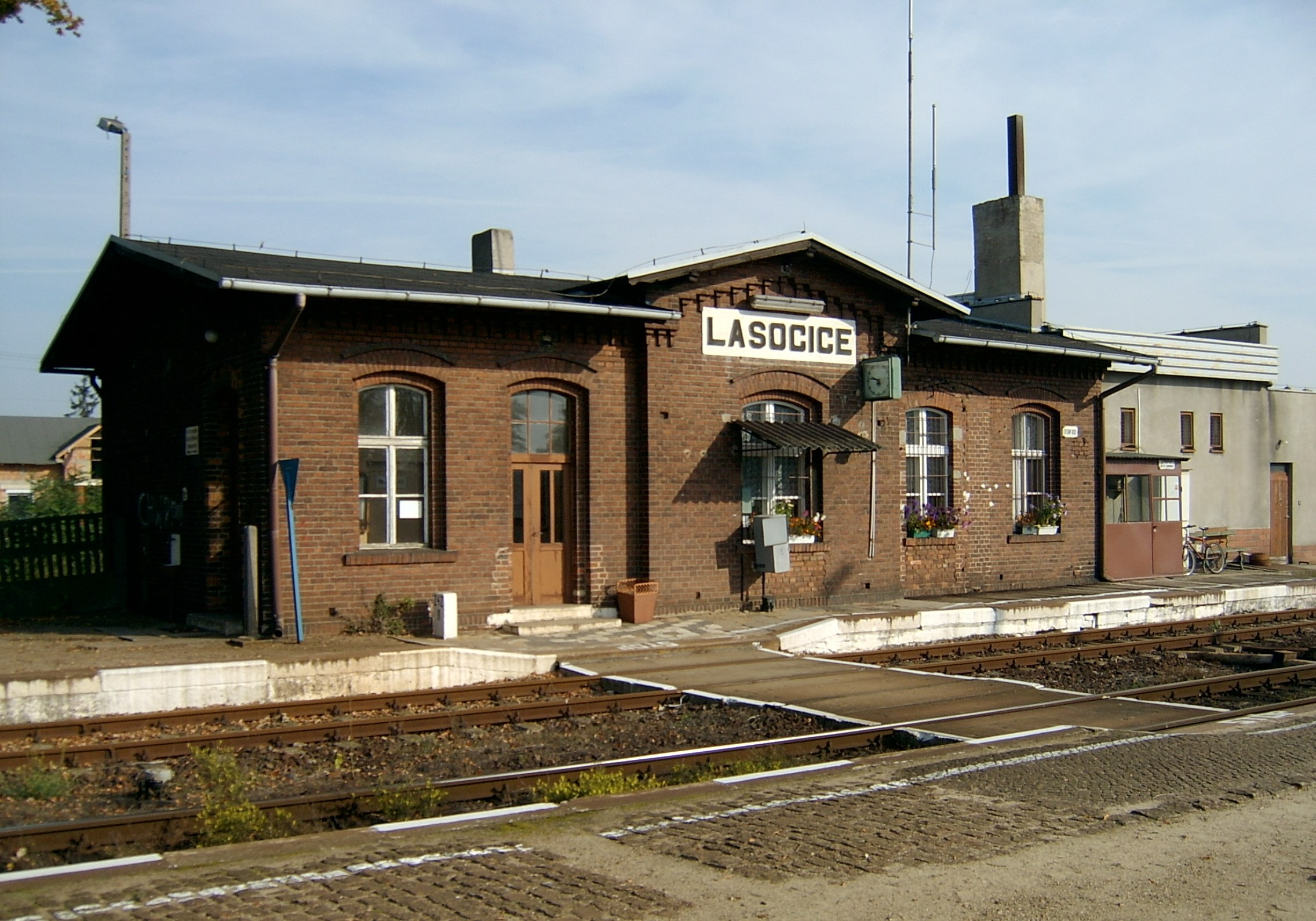 Stacja kolejowa w Lasocicach.